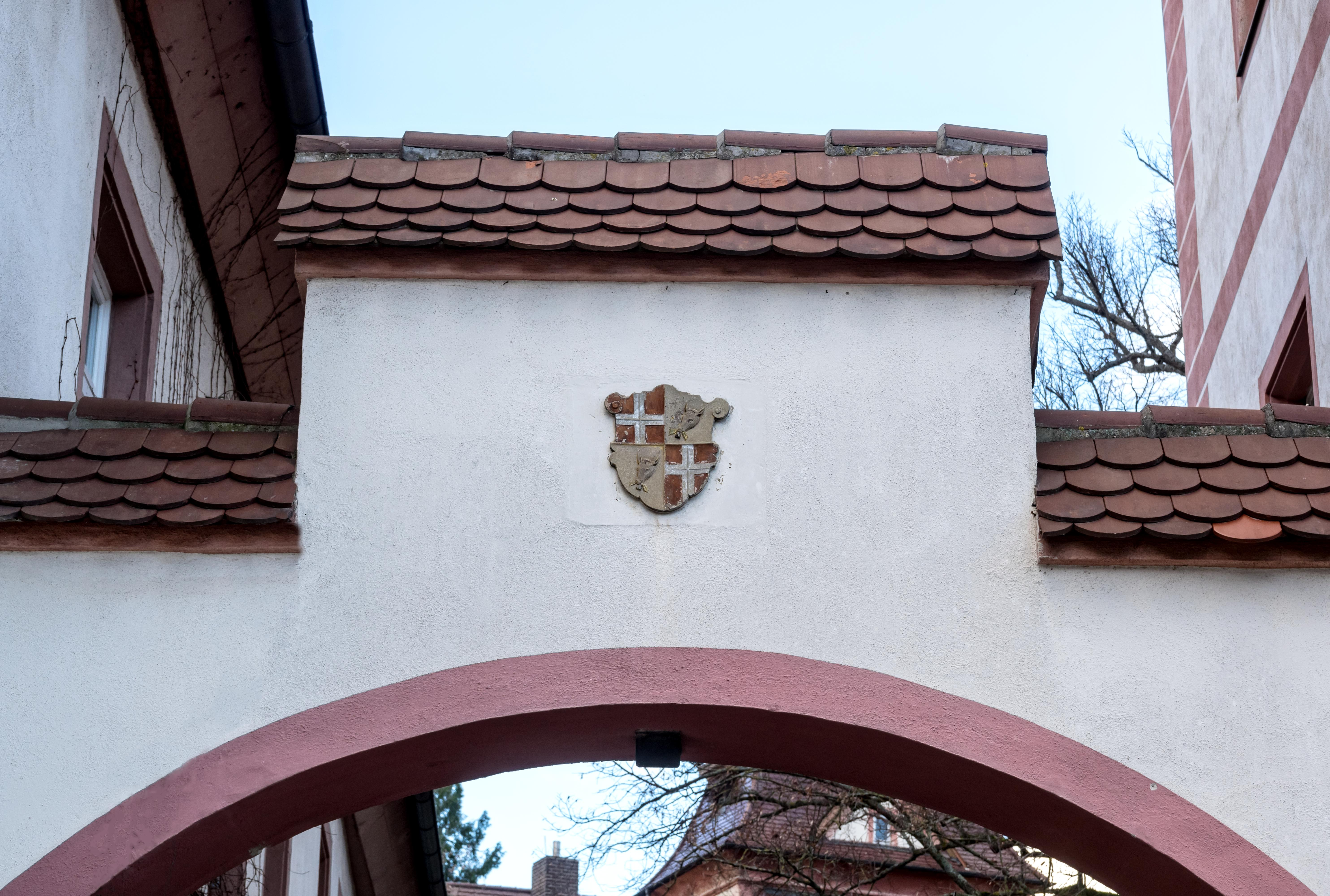 Bilder aus Heitersheim Das ehemalige Malteserschloss Heitersheim, jetzt im Besitz des Ordens der barmherzigen Schwestern vom Hl. Vinzenz von Paul. Wappen über dem Osteingang